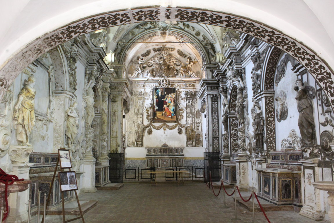 Chiesa di Santa Caterina da Siena. Stile tardo barocco siciliano